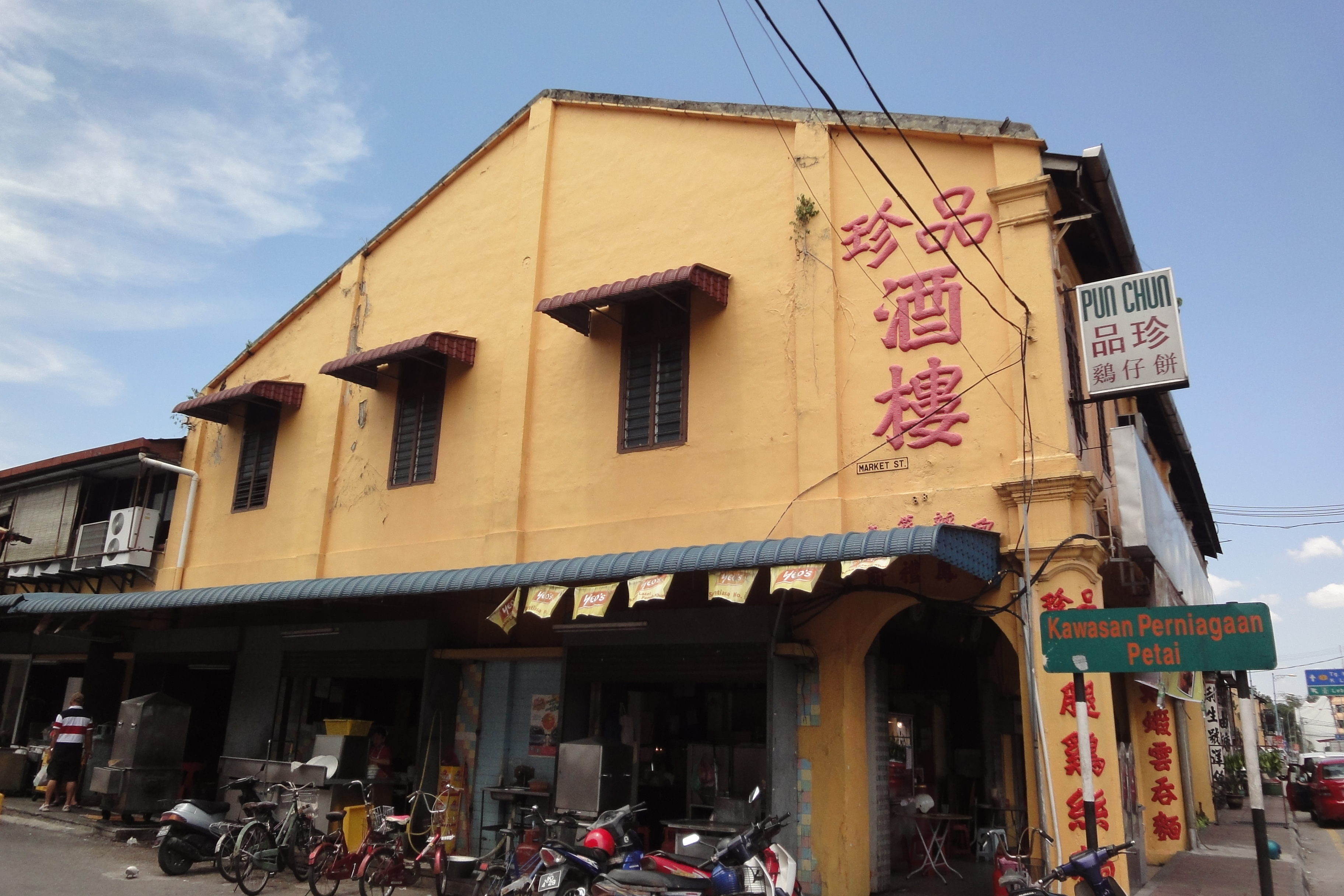 品珍酒楼